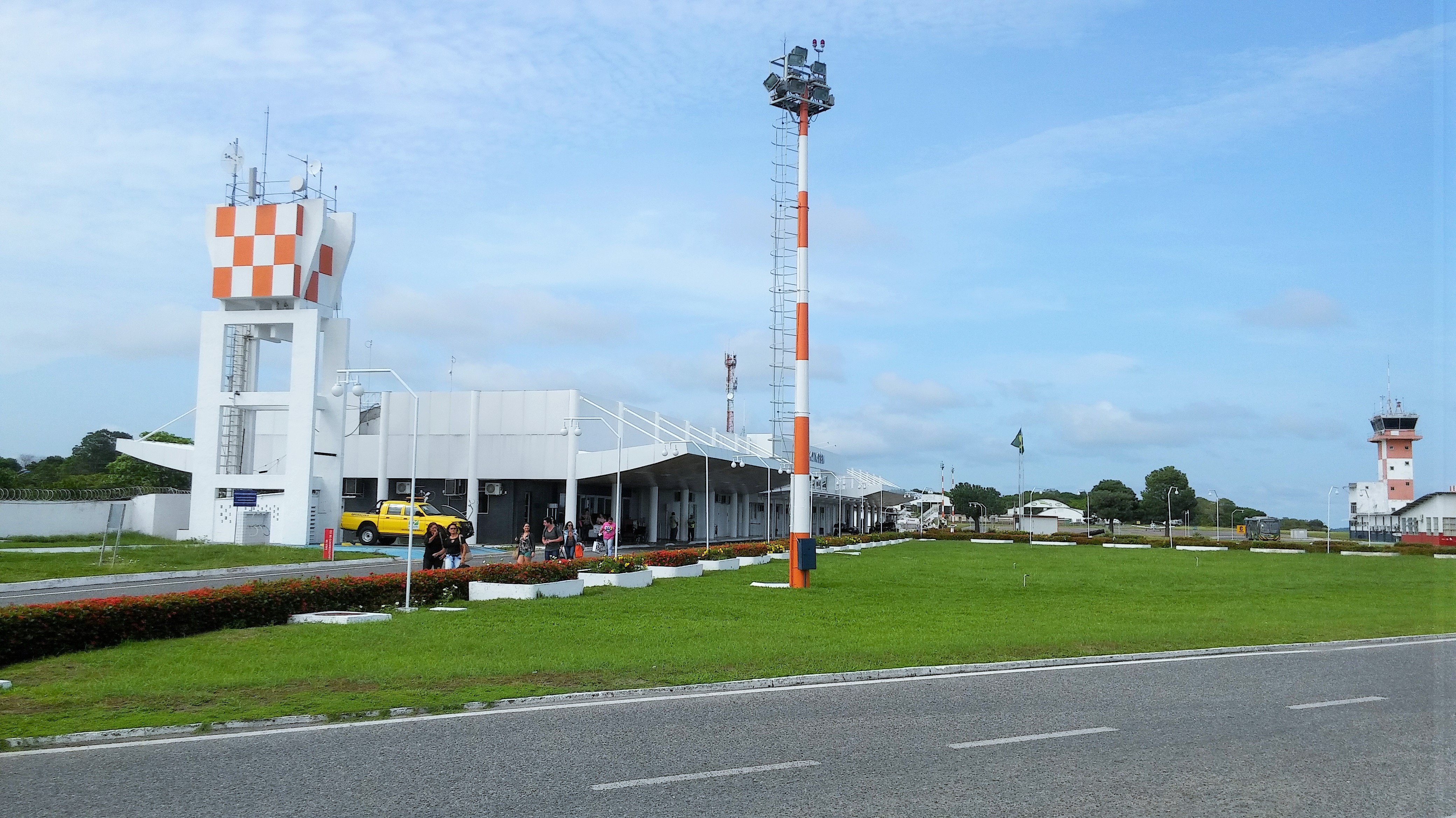 Aeroporto Internacional de Santarém.